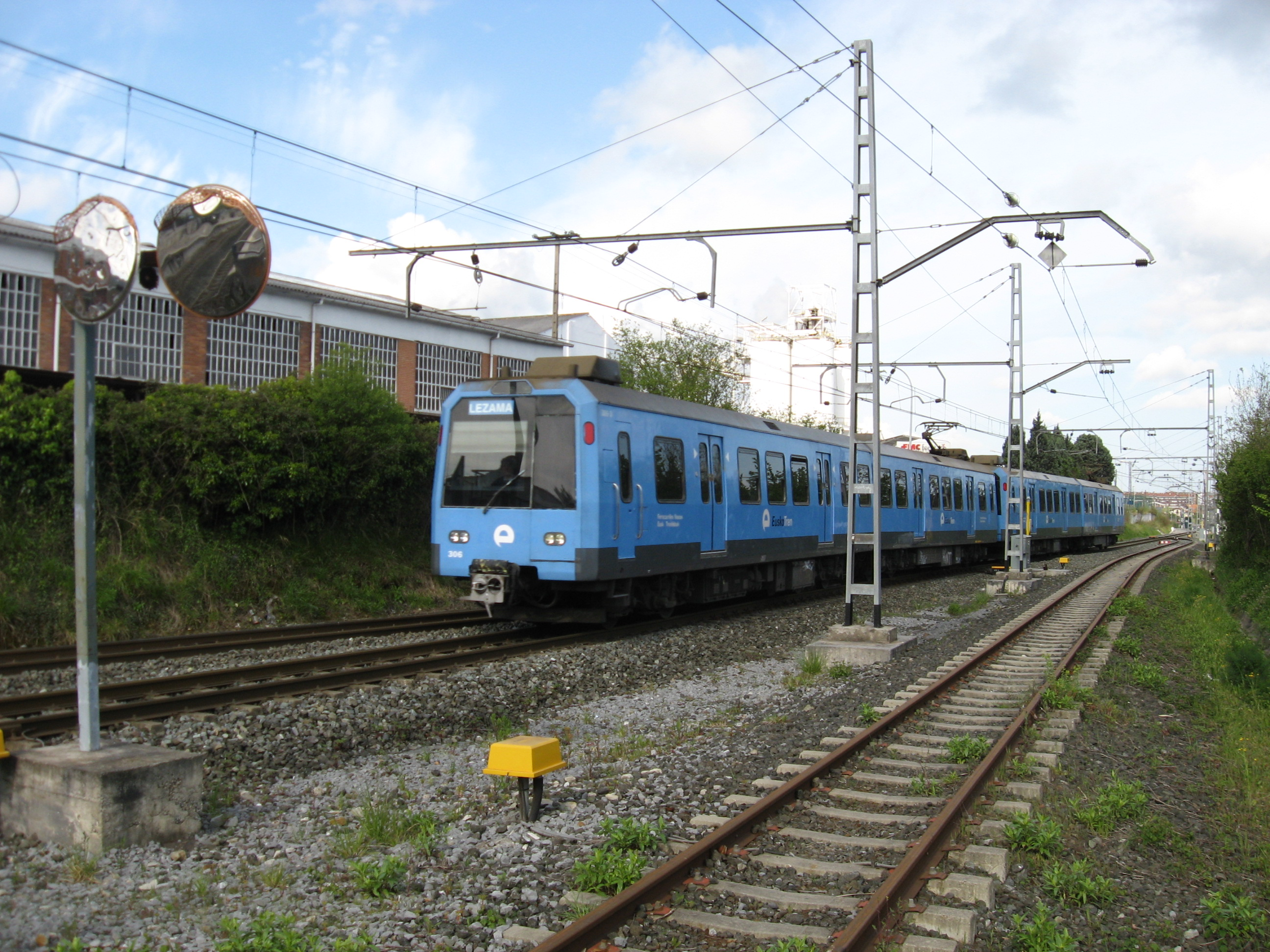 EuskoTren richting Lezanna